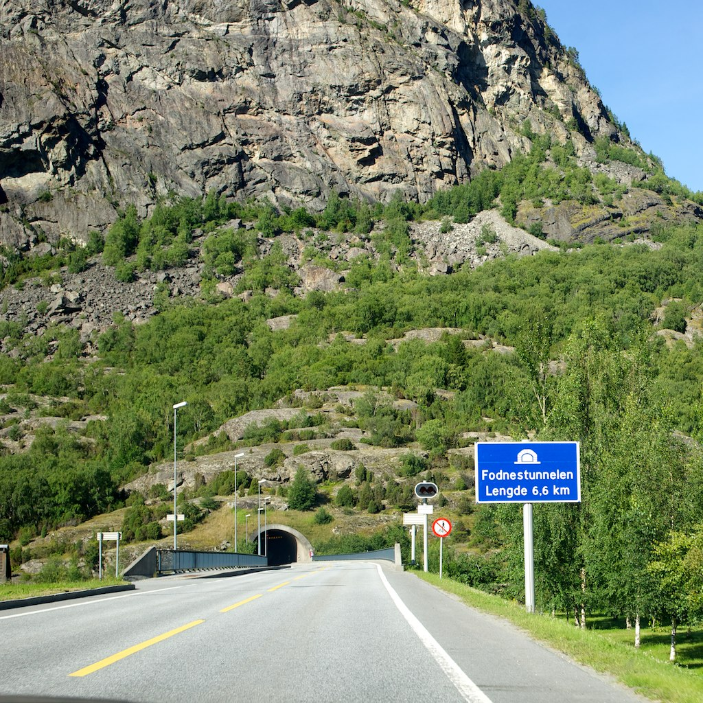 Fodnestunnelen in Lærdal, Norway